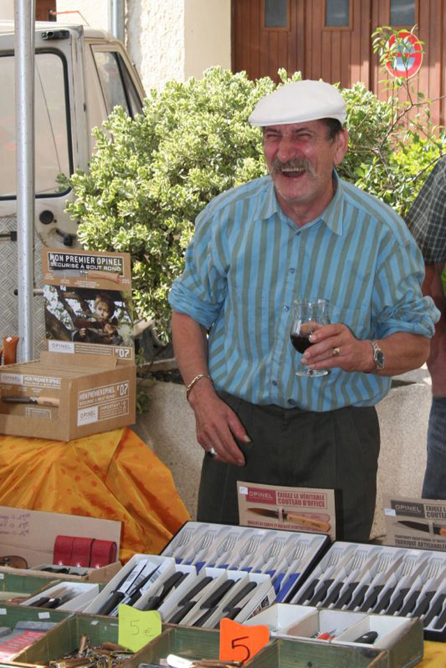 Le bon vin réjouit le coeur de l'homme